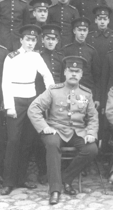 Воспитатель Пажеского корпуса Александр Николаевич Фену на групповом снимке с воспитанниками младших классов корпуса.